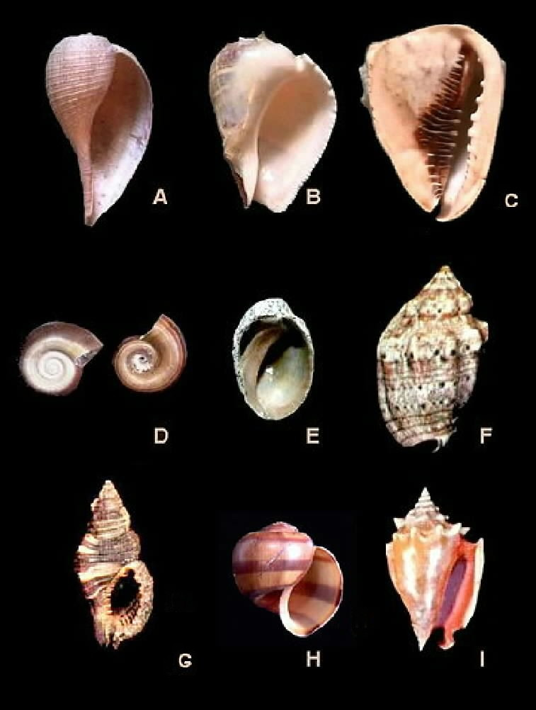 Moluscos del estado Falcón - Venezuela A. Ficus communis B. Melongena melongena C. Cassis tuberosa D. Marisa cornuarietis E. Purpura patula' F. Voluta musica G. Cymatium martinianum H. Pomacea glauca I. Strombus pugilis